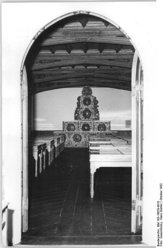 Wittenberg, Lutherhaus, Großer Hörsaal Zentralbild Quasch. 20.10.1952 Zur 450- Jahrfeier der Martin- Luther-Universität Halle- Wittenberg vom 18. bis 25.10.52 Während der Festwoche haben die auswärtigen Gäste die Gelegenheit, die historischen Stätten der alten Lutherstadt Wittenberg zu besichtigen. In dem Luther- Haus in Wittenberg sind alte Schriften und Gegenstände, die in Luthers Leben eine Rolle spielten, ausgestellt. - Blick auf den grossen Hörsaal, den Luther den Studenten seiner Zeit zur Verfügung gestellt hat. (Im Hintergrund) das alte Katheder.